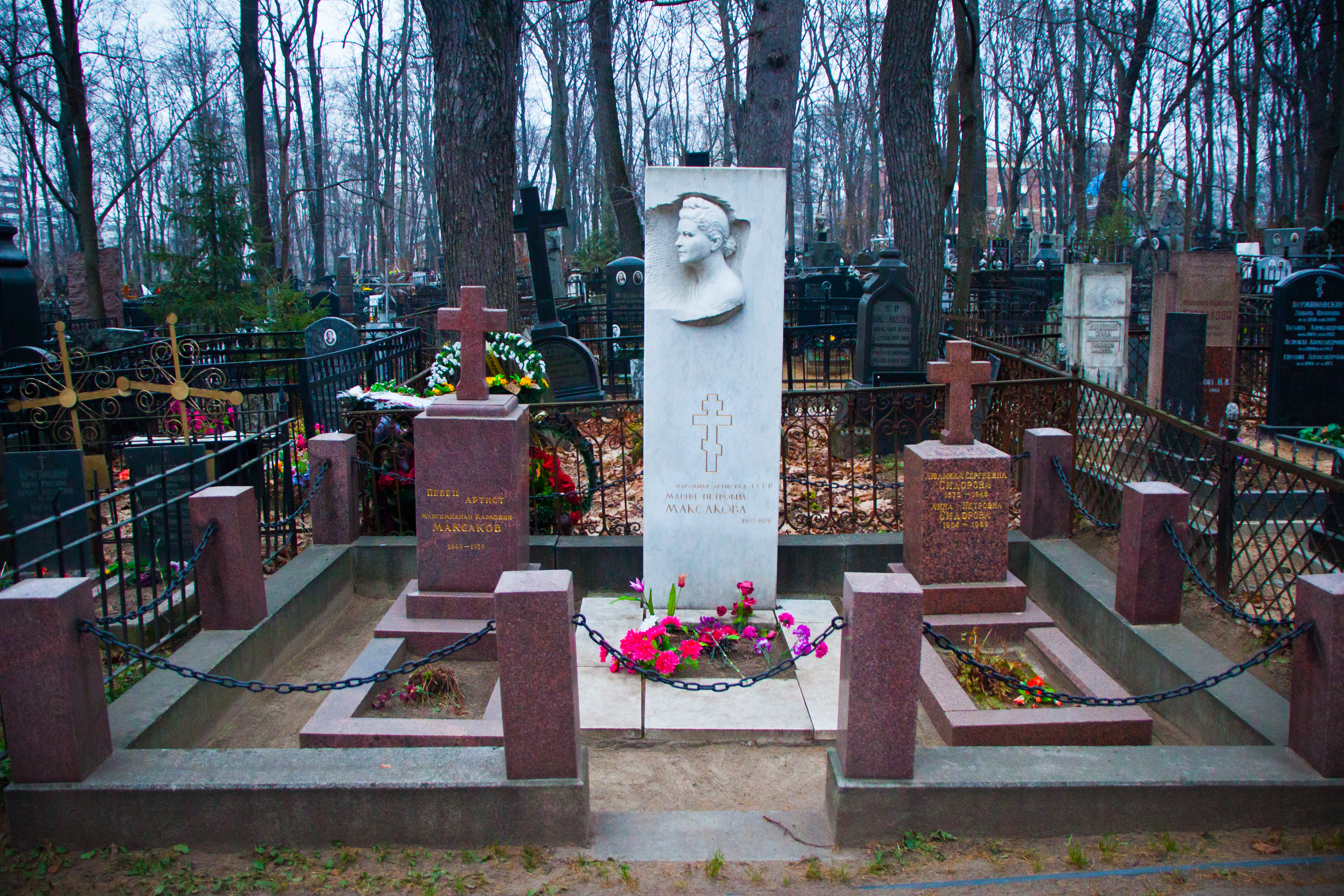 Введенское кладбище (Москва)